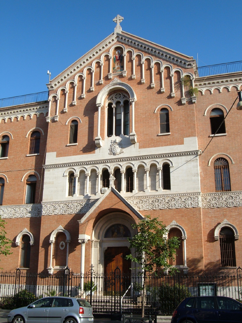 Chiesa di San Patrizio a Villa Ludovisi, a Roma, nel rione Ludovisi.